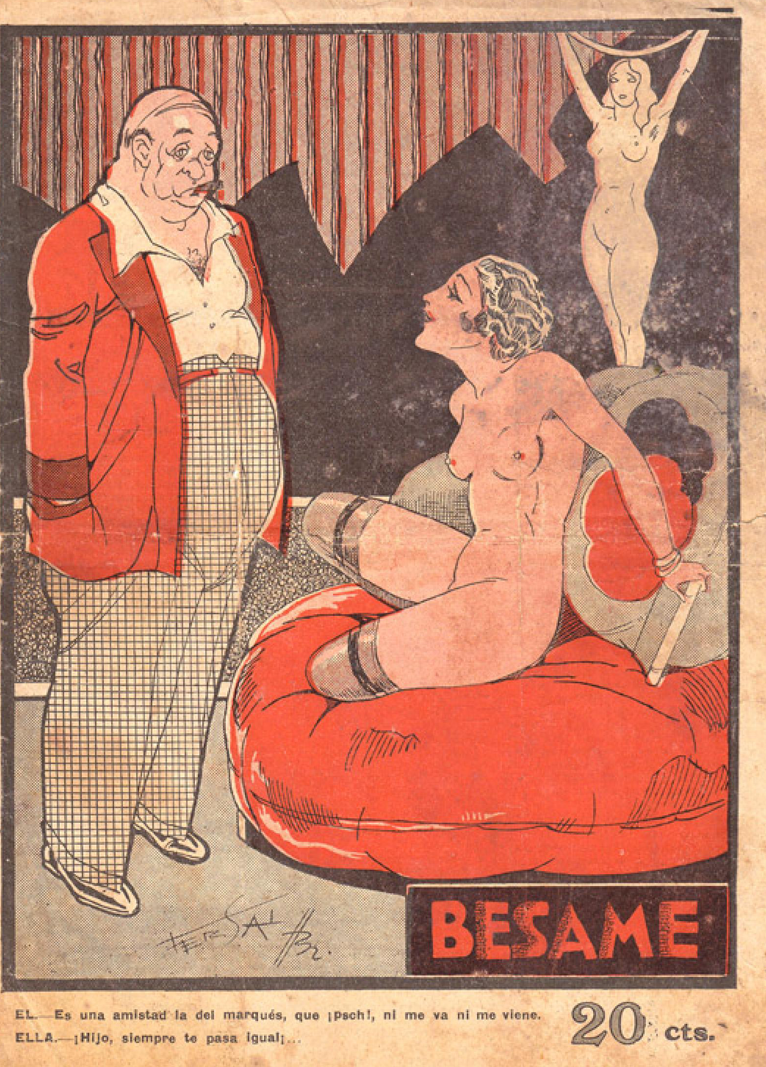 Il·lustració publicada per Fersal en 1932.